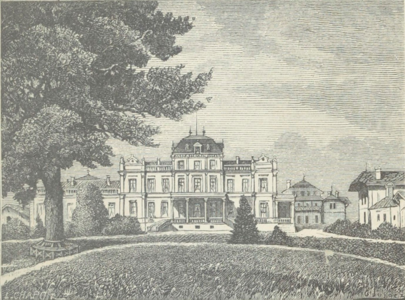 Illustration du Château Giscours dans l'ouvrage Bordeaux et ses vins (7ème édition) de Charles Cocks et Edouard Féret publié en 1898